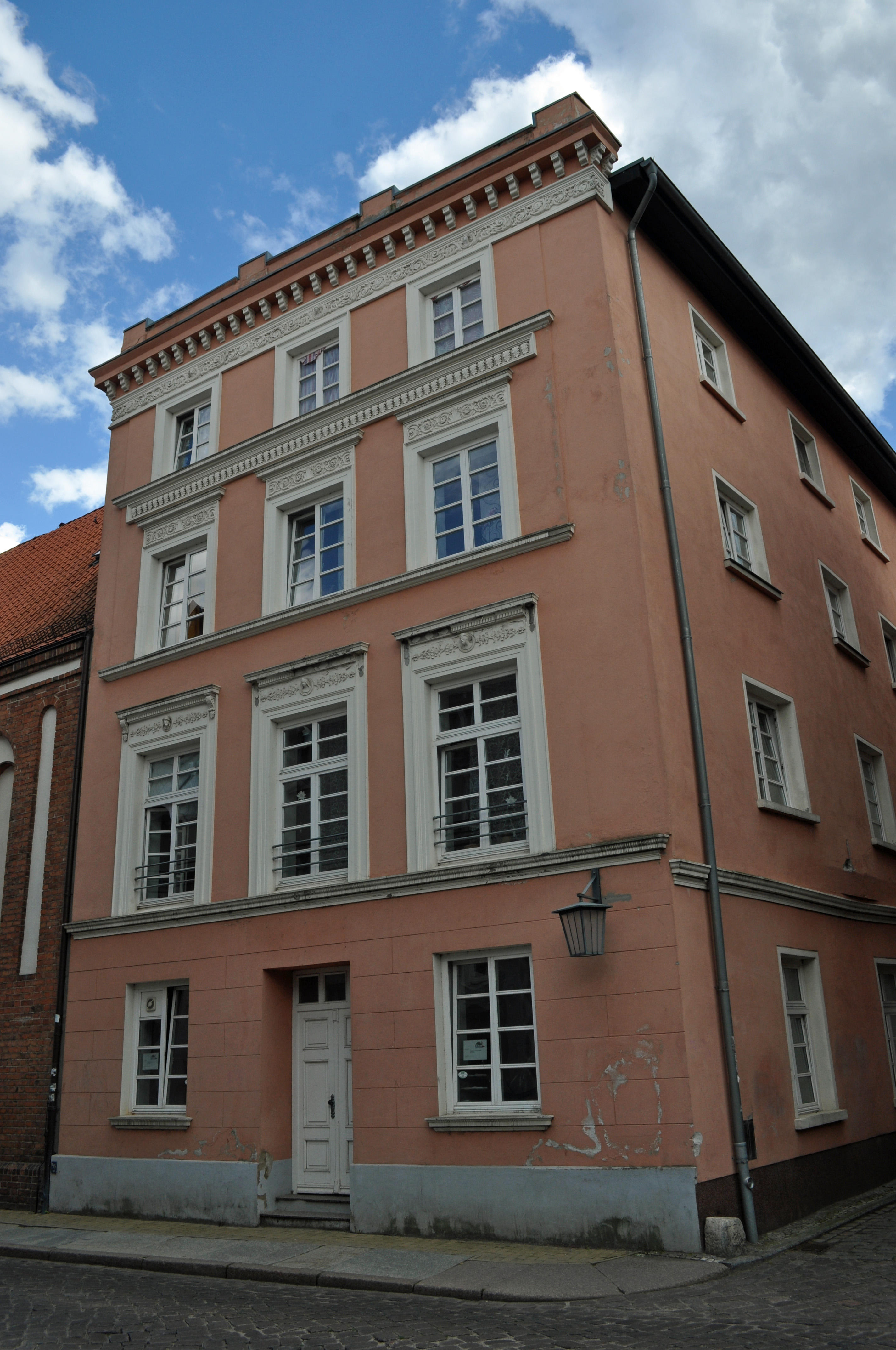 Das Foto zeigt ein Haus (bzw. Details des Hauses) in der Frankenstraße in Stralsund, Deutschland. Die Hausnummer steht im Dateinamen. Aufgenommen am 19. Juli 2011 vom Benutzer:Klugschnacker.